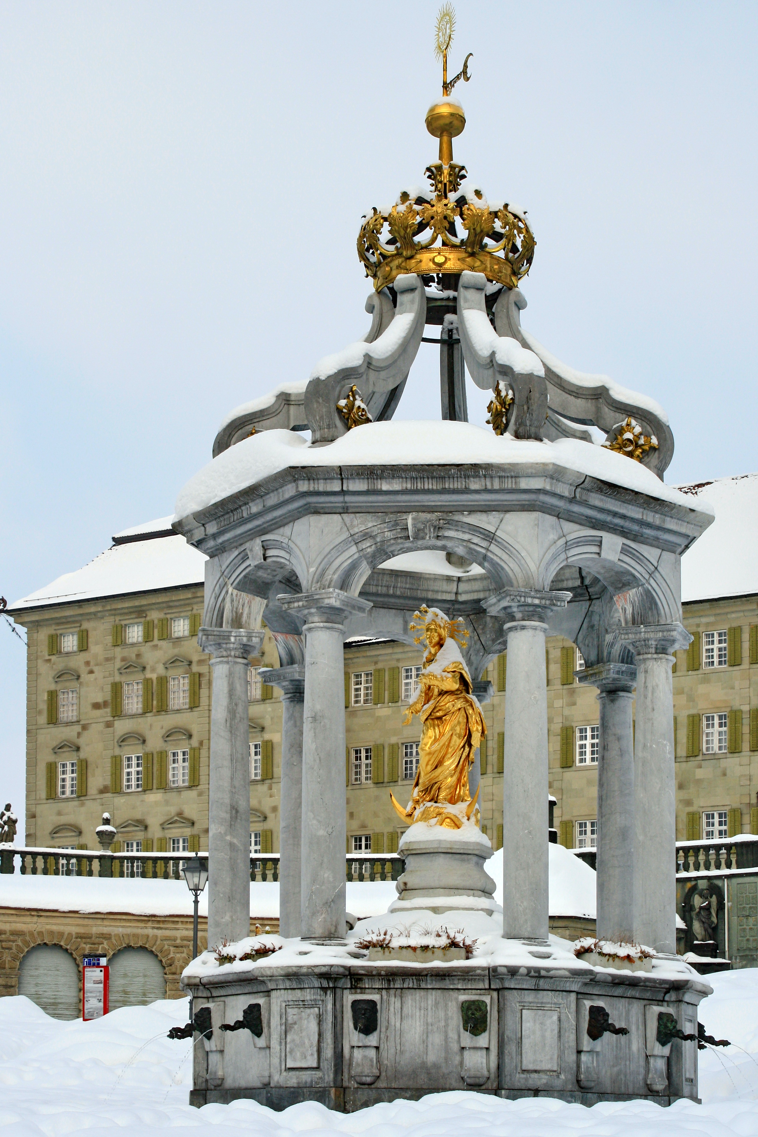 Marienbrunnen in front of the Abbey in Einsiedeln (Switzerland)